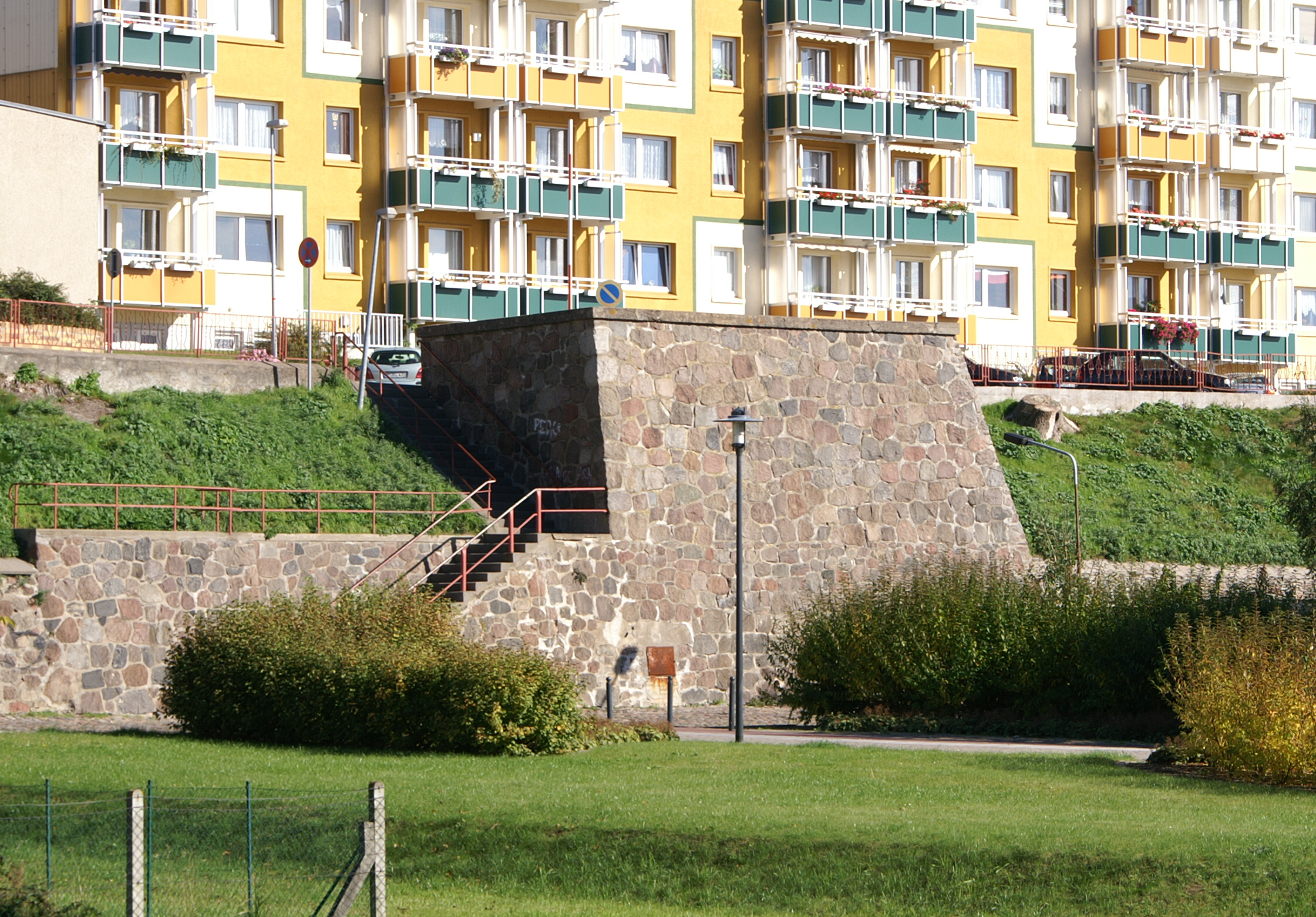 Demmin - Südmauer am Kahldenwallweg